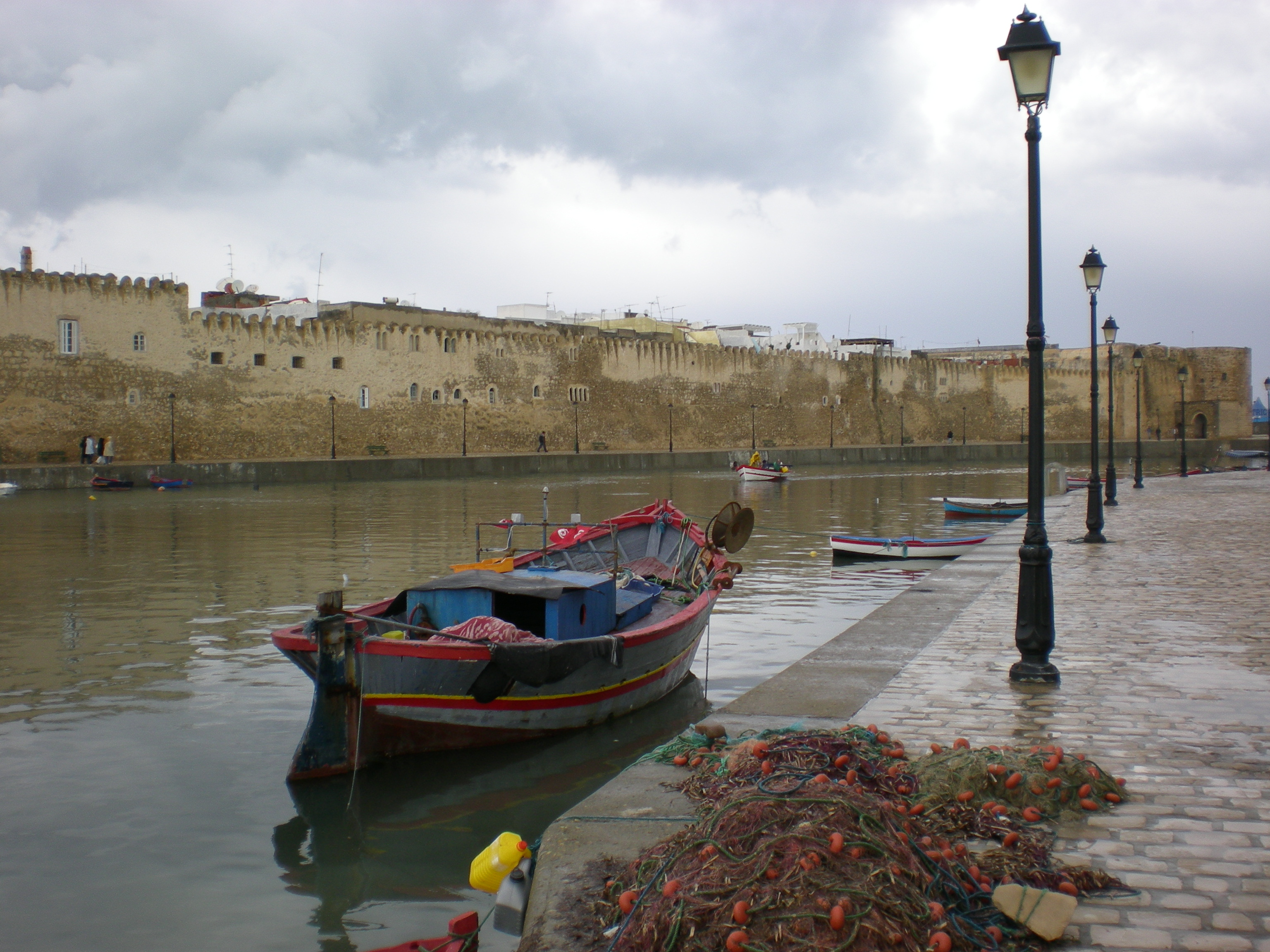 Embouchure du port de pêche de Bizerte, au fond le Ribat de la vieille ville.